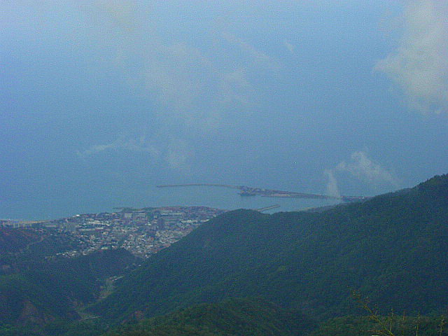 La Guaira. Vargas State, Venezuela.